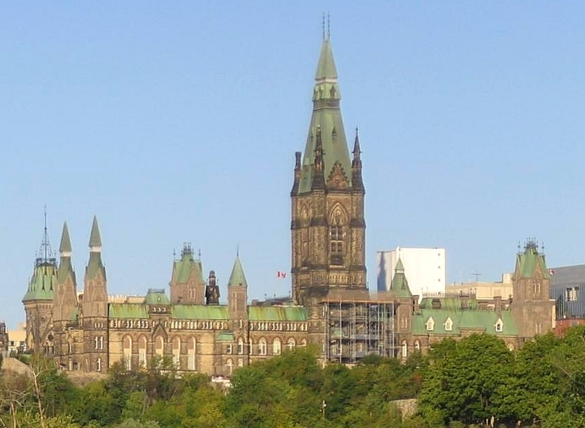 Édifice de l'Ouest, Colline du Parlement, Ottawa, vue depuis le pont du Portage / West Block, Parliament Hill, Ottawa, seen from the Portage Bridge